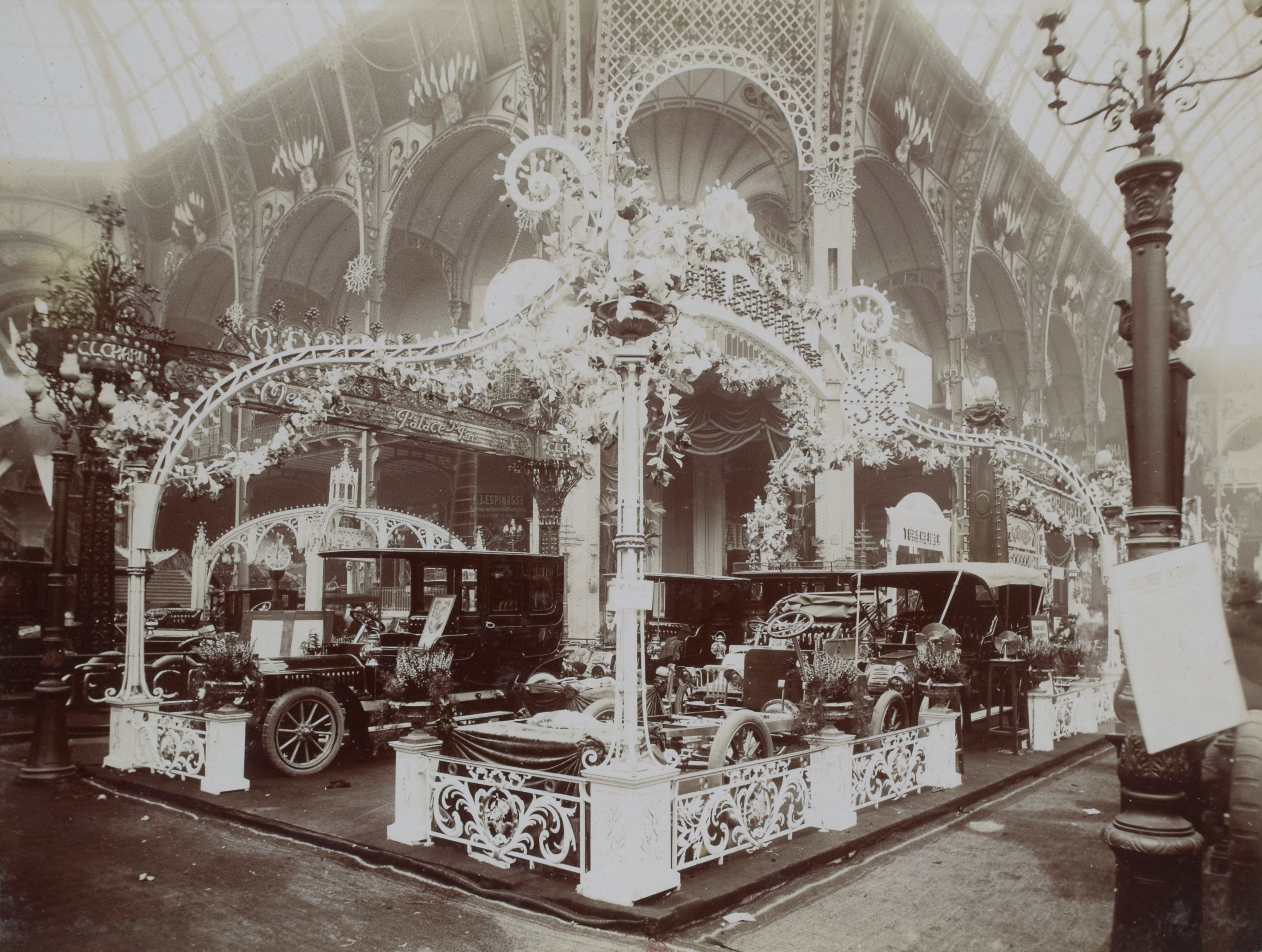 [Collection Jules Beau. Photographie sportive] : T. 31. Années 1905 et 1906 / Jules Beau : F. 17. [8e Salon de l'automobile, du cycle et des sports, 8 décembre 1905]